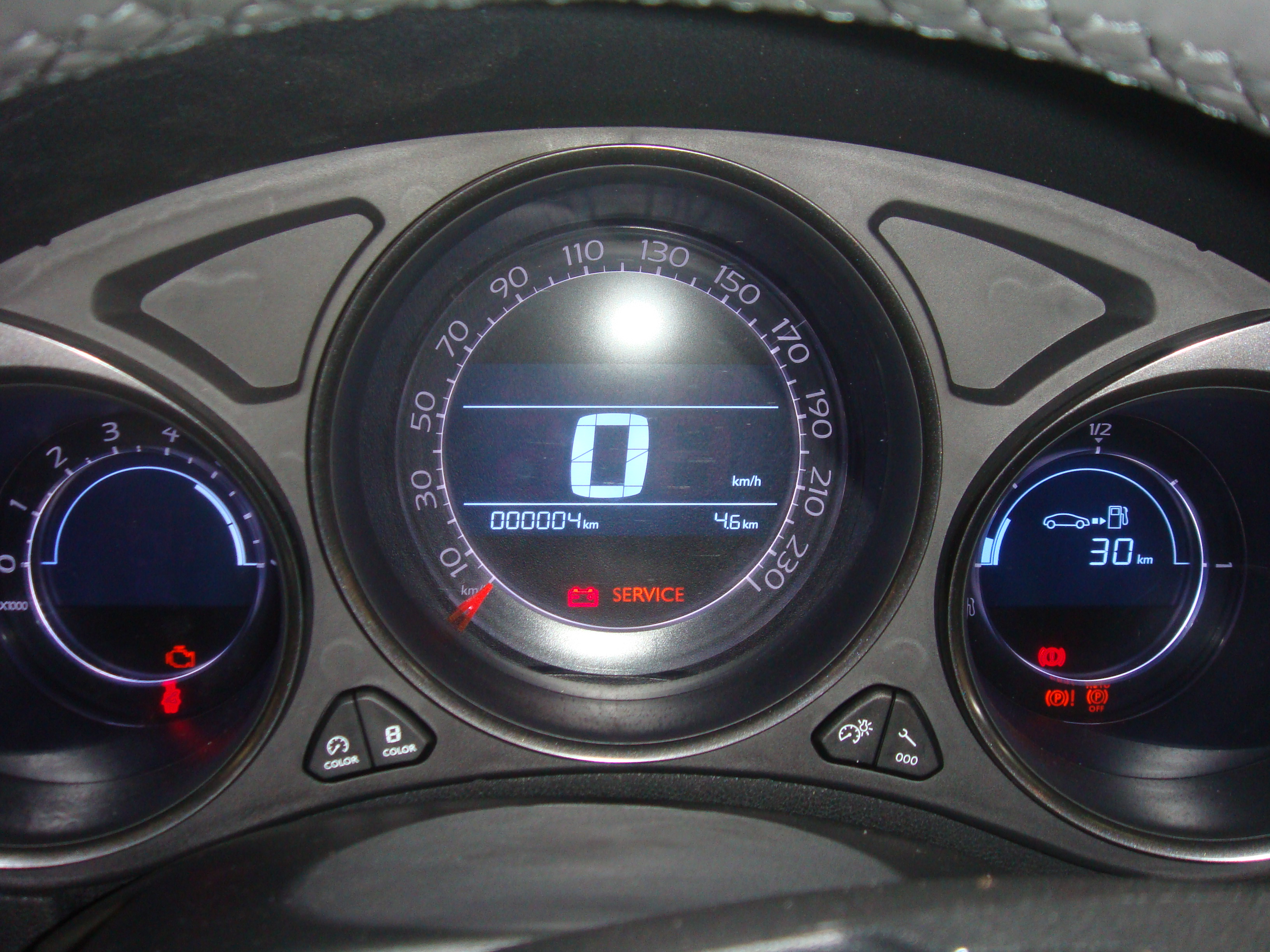 Tableau de bord de la Citroën C4